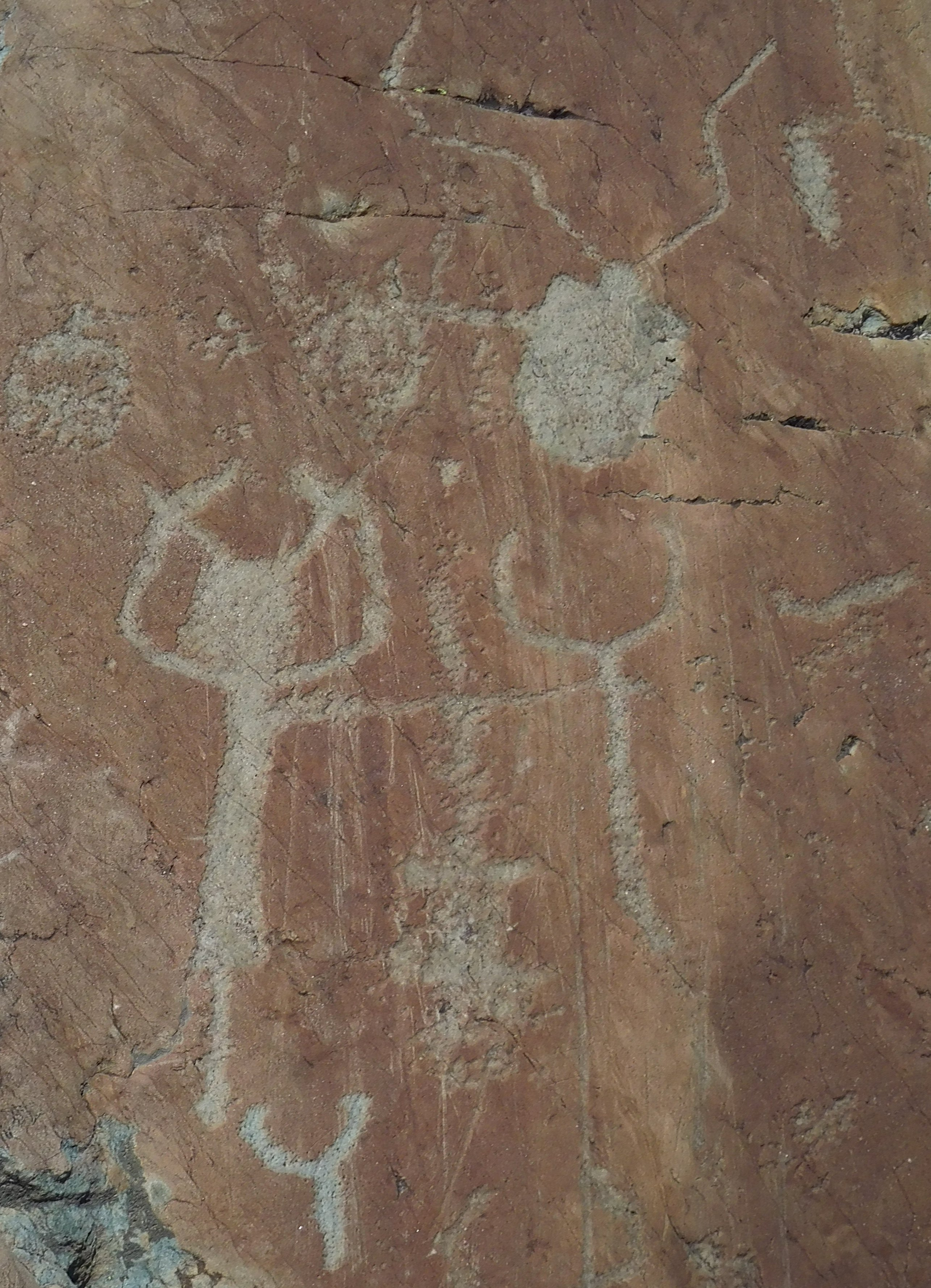 Attelage et cornus, au nord-ouest des lacs Jumeaux de Fontanalba, dans une zone de rochers en bas.